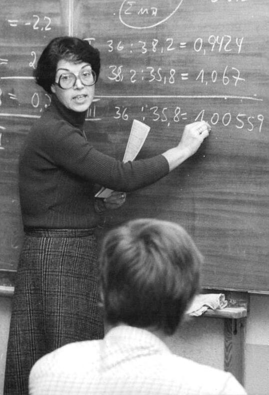 ADN-ZB/Settnik-15.12.82-Berlin: Abgeordnete (CDU) Seit 1967 ist Frau Dr.rer.oec.Rosemarie Krautzig als Abgeordnete in der Volkskammer. Die 46-jährige Diplomwirtschaftlerin arbeitet seit 1976 im Ausschuß für Haushalt und Finanzen. Die Lektorin für Statistik an der Hochschule für Ökonomie "Bruno Leuschner" engagiert sich auch in ihrem Wohngebiet sehr für ihre Mitbürger, wo sie seit 1957 im WBA mitarbeitet.